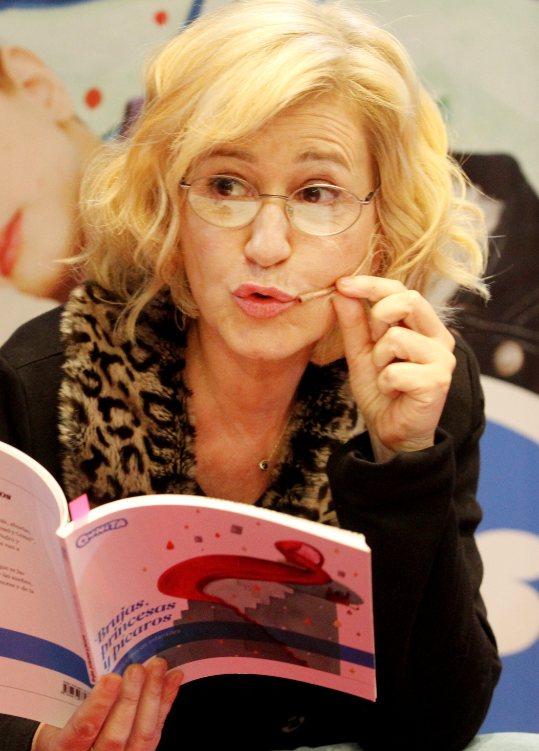 Buenos Aires, 24 de septiembre de 2015 "Cuentos de Cuna", organizado por el Ministerio de Cultura de la Nación y el Ministerio de Salud de la Nación, se presentó en el Centro Cultural Kirchner. Donde tiene lugar un espacio de juego y creatividad, conducido por el equipo de educadores del Centro Cultural Kirchner. La actriz Mercedes Morán participó del espacio, donde tuvo la oportunidad de leer el cuento “Pedro y el lobo” a decenas de niños presentes. Participó del evento Franco Vitali, secretario de Políticas Socioculturales del Ministerio de Cultura de la Nación, y Nicolás Kreplak, secretario de Salud Comunitaria del Ministerio de Salud de la Nación.